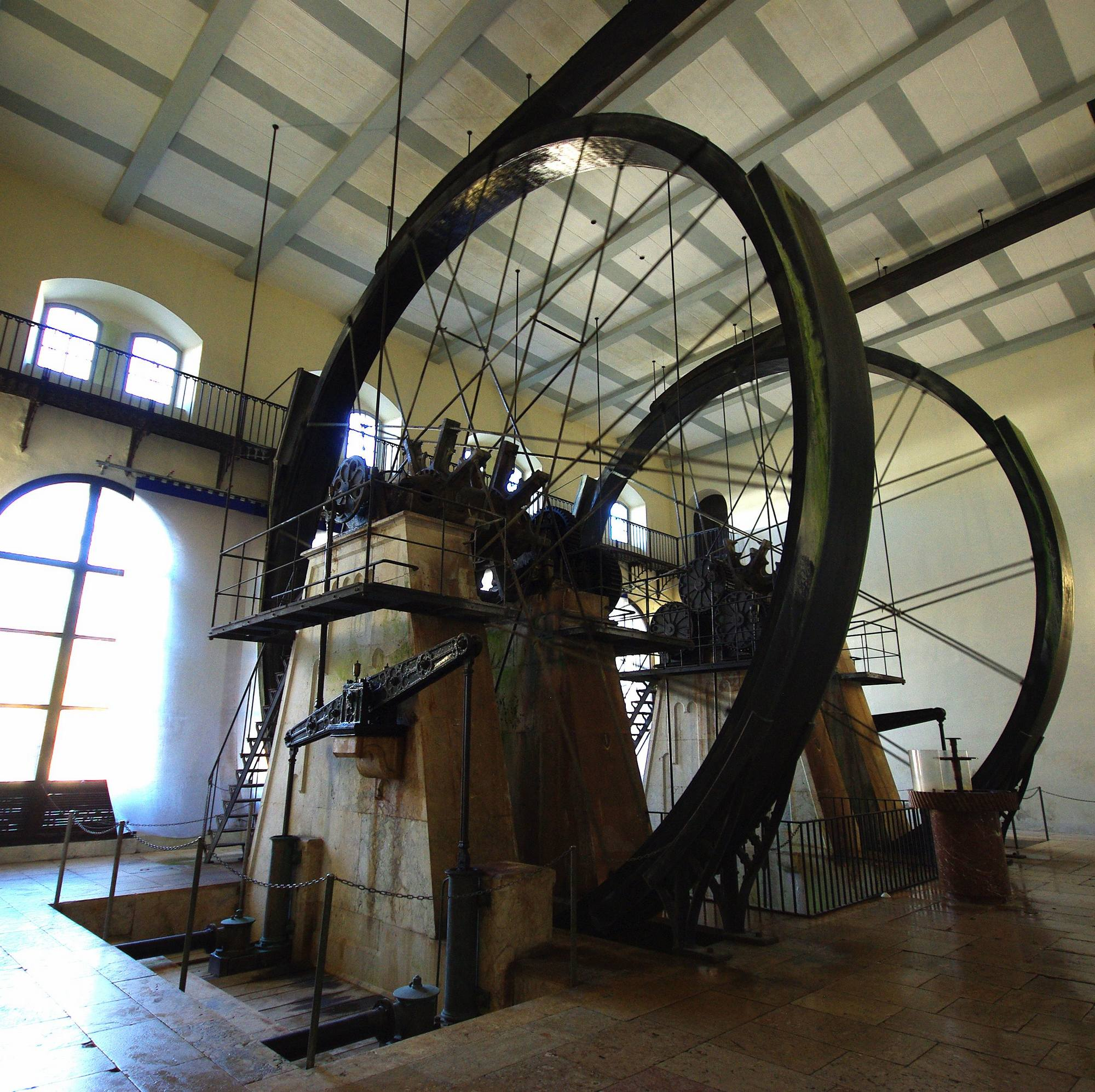 Alte Saline in 83435 Bad Reichenhall, Maschinenhalle im Hauptbrunnhaus; Wasserräder This is a photograph of an architectural monument.